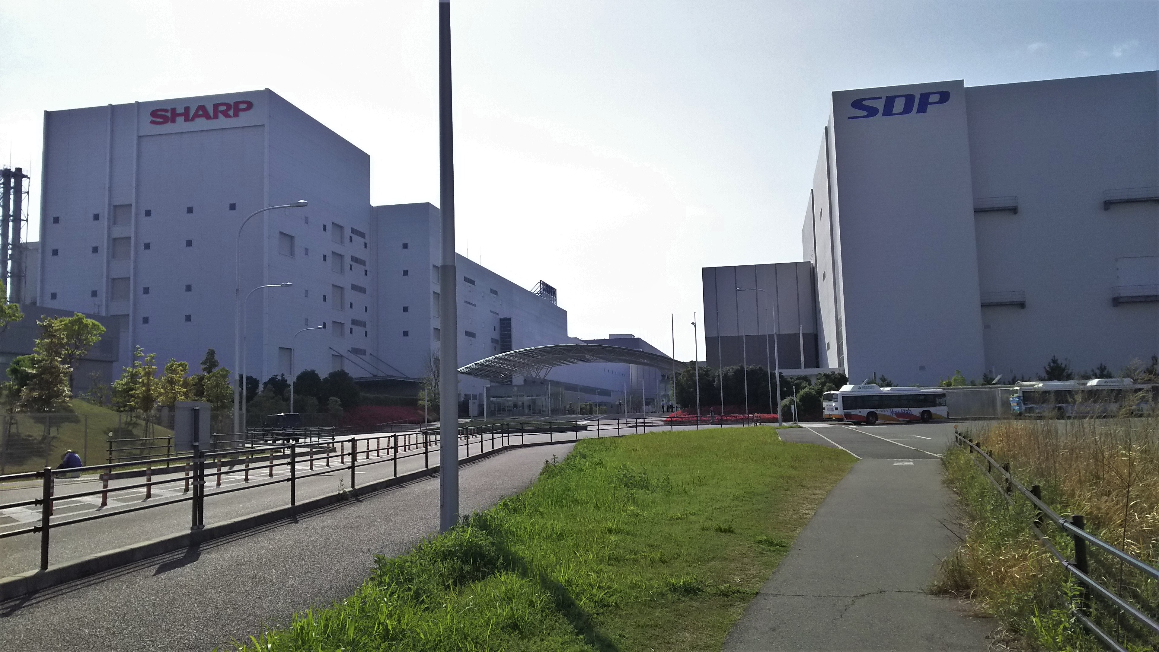 シャープ堺工場と堺ディスプレイプロダクト（大阪府堺市）